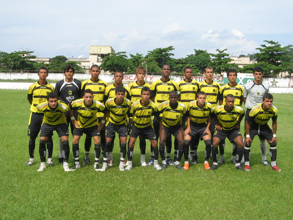 Equipe de Juniores do Volta Redonda FC, em 2008. Foto de Paulo Roberto Rodrigues.